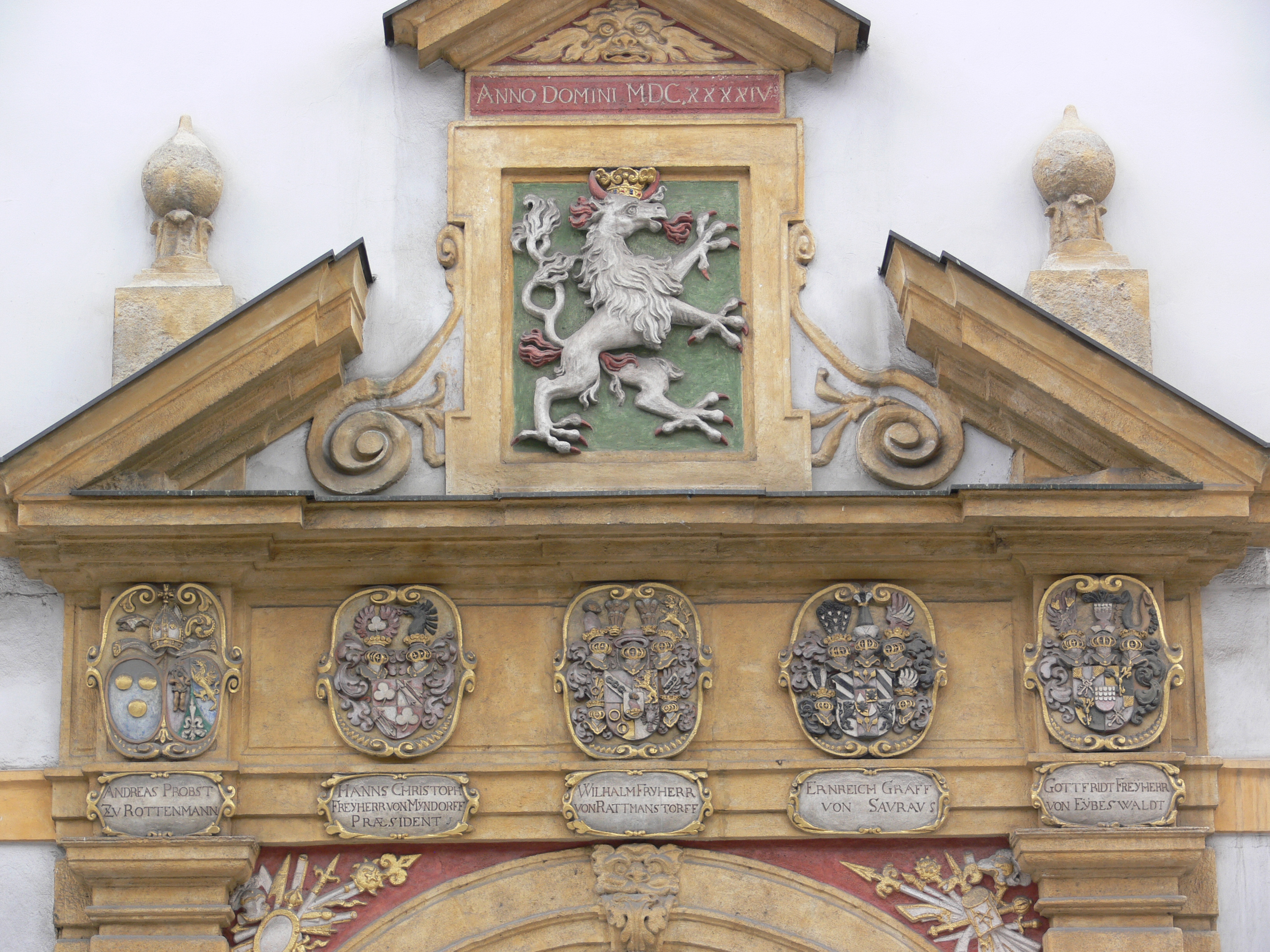 Graz, Zeughaus, Fassade Wappen am Portal